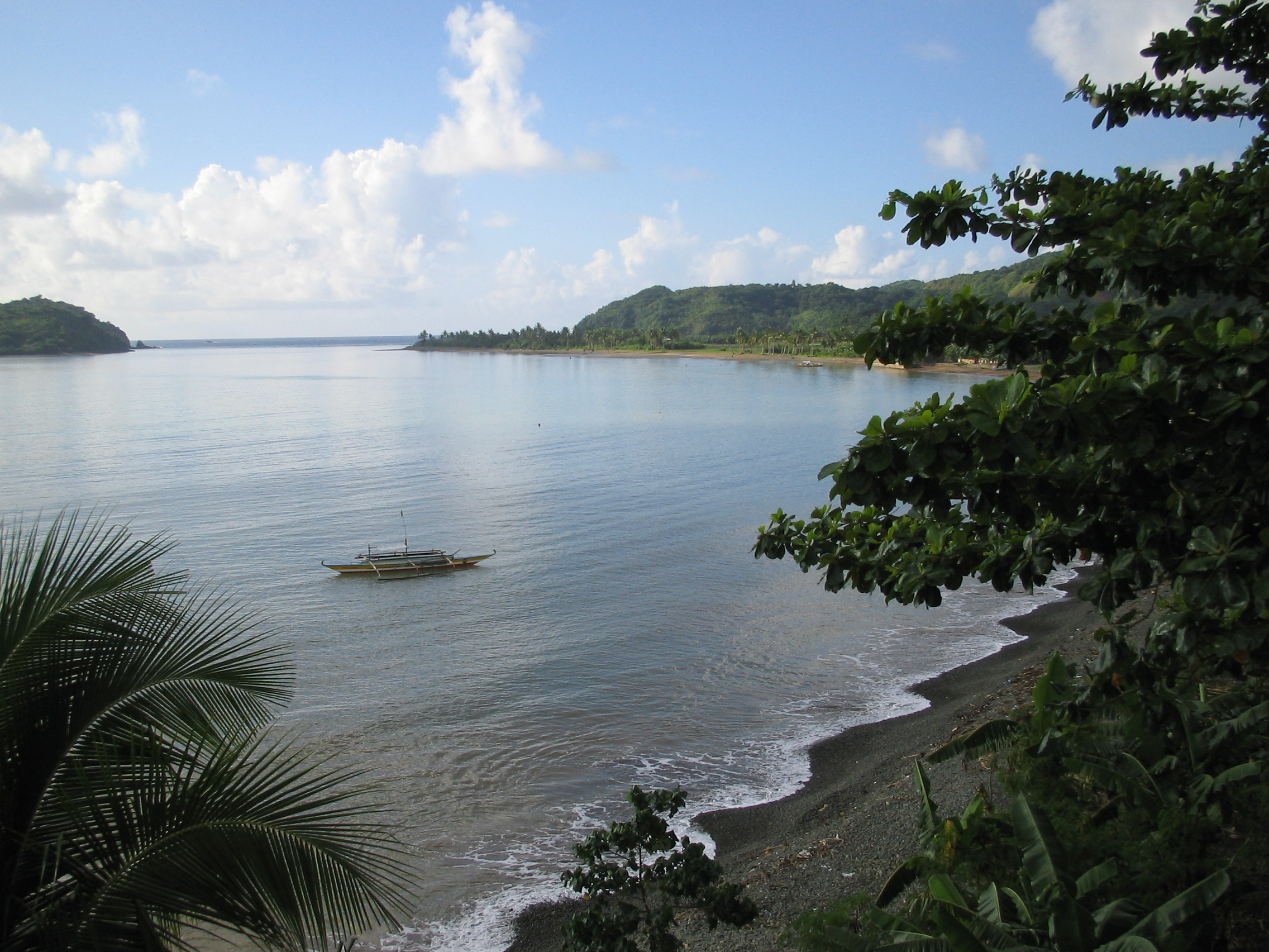 Gigmoto, Catanduanes, Philippines